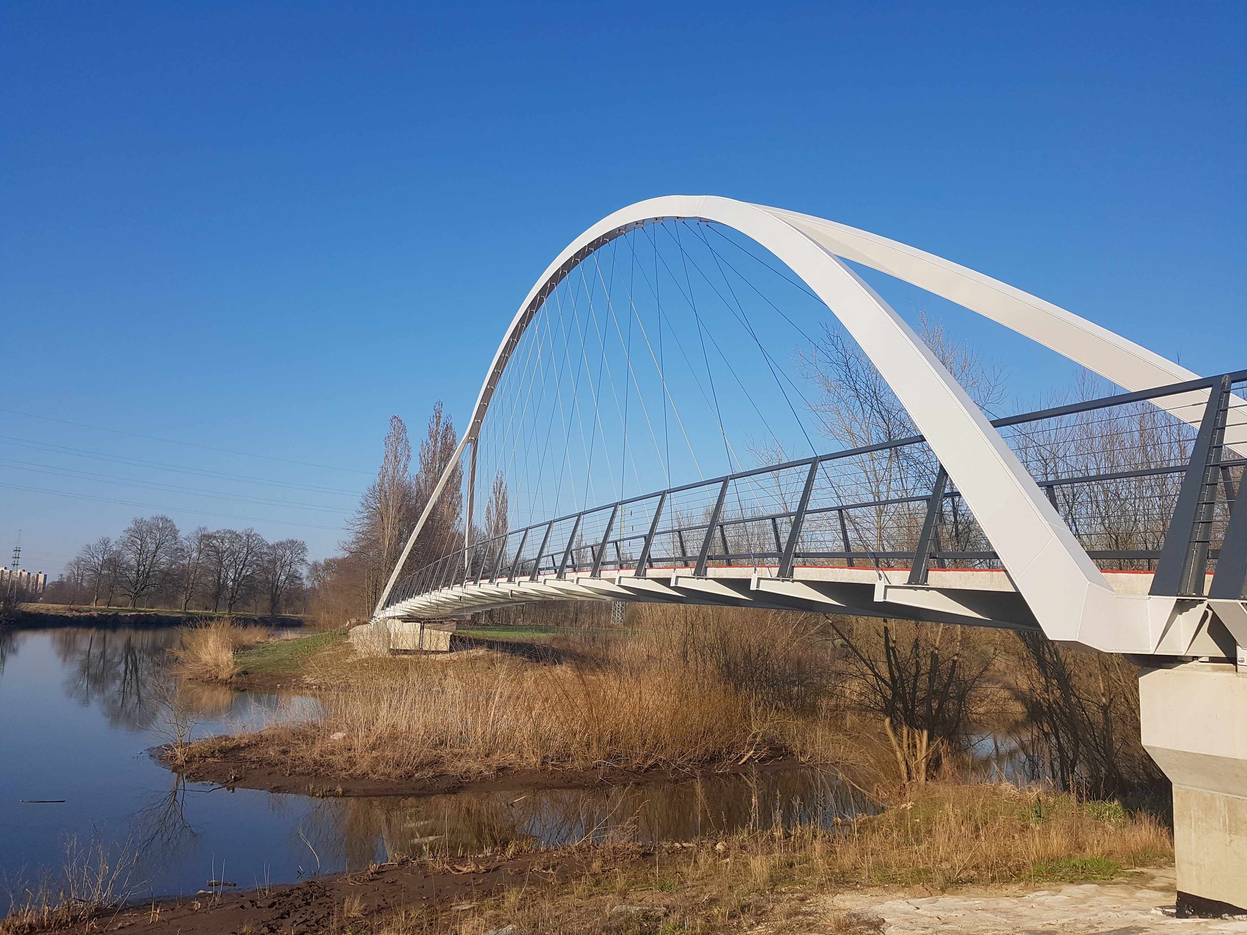 Lávka přes labské slepé rameno Jesípek na cyklostezce z Hradce Králové do Vysoké nad Labem